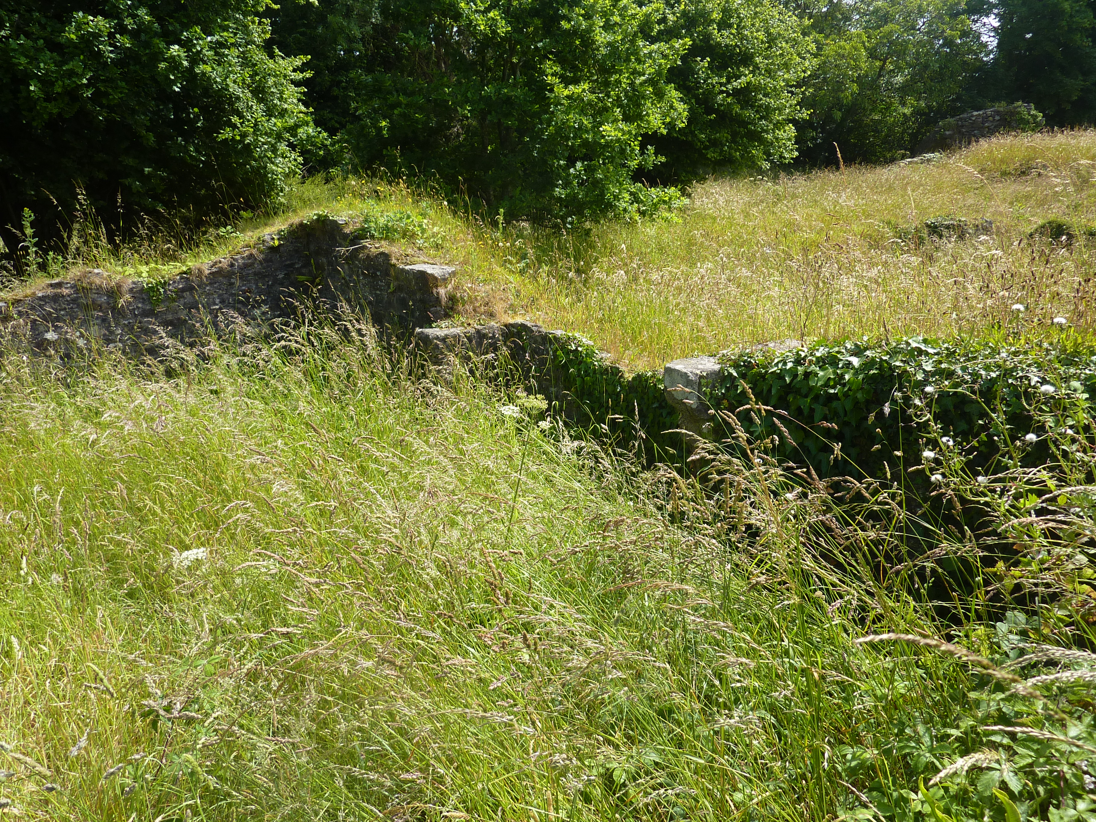 La Forest-Landerneau Les ruines du château de Joyeuse Garde émerge à peine des herbes recouvrant le site